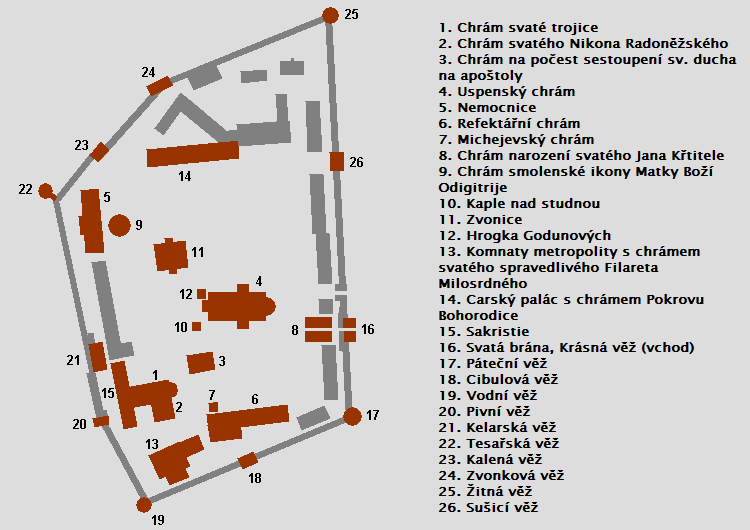 Plánek Trojicko-sergijevské lávry s popiskem